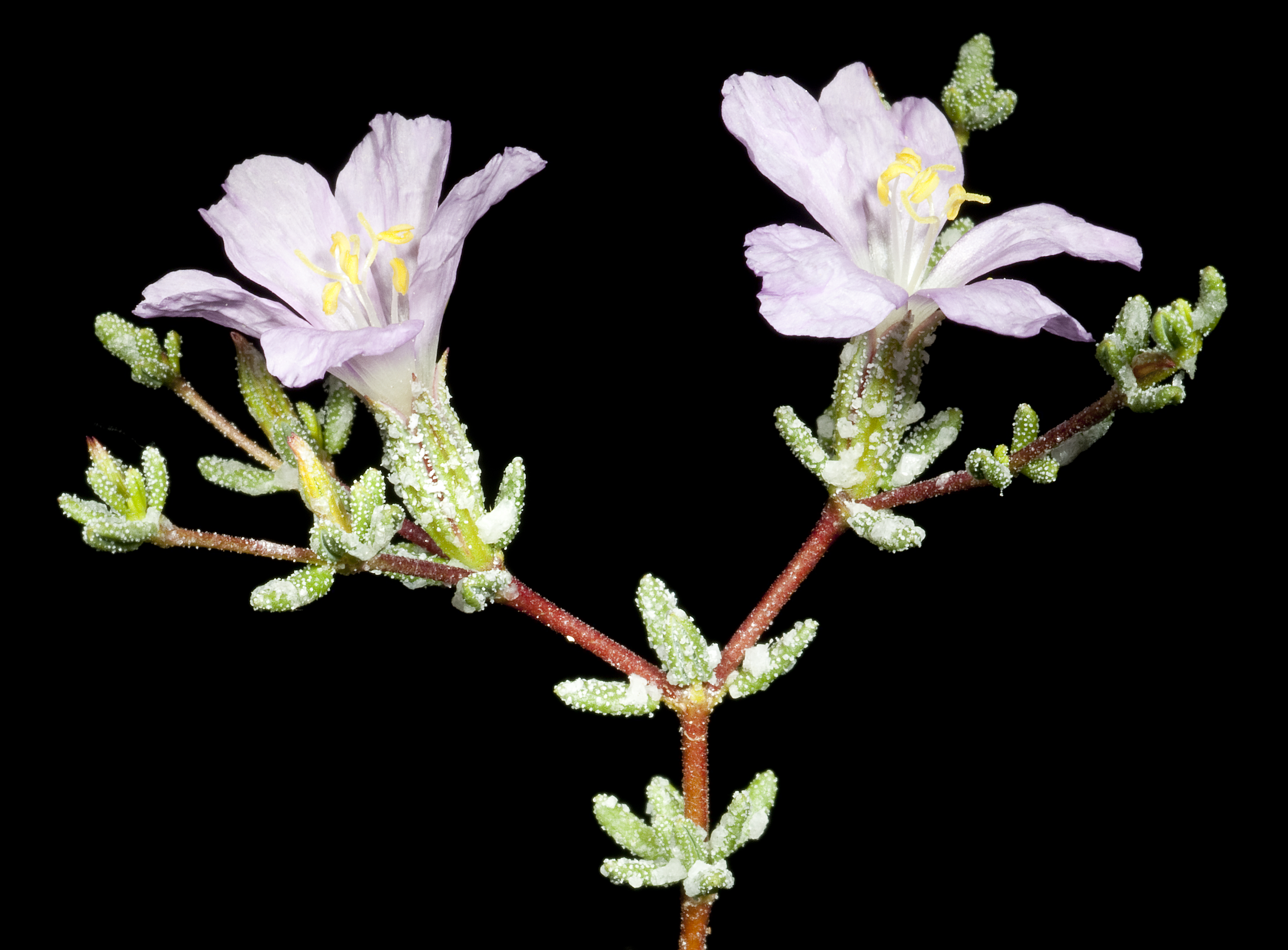 KRT4148